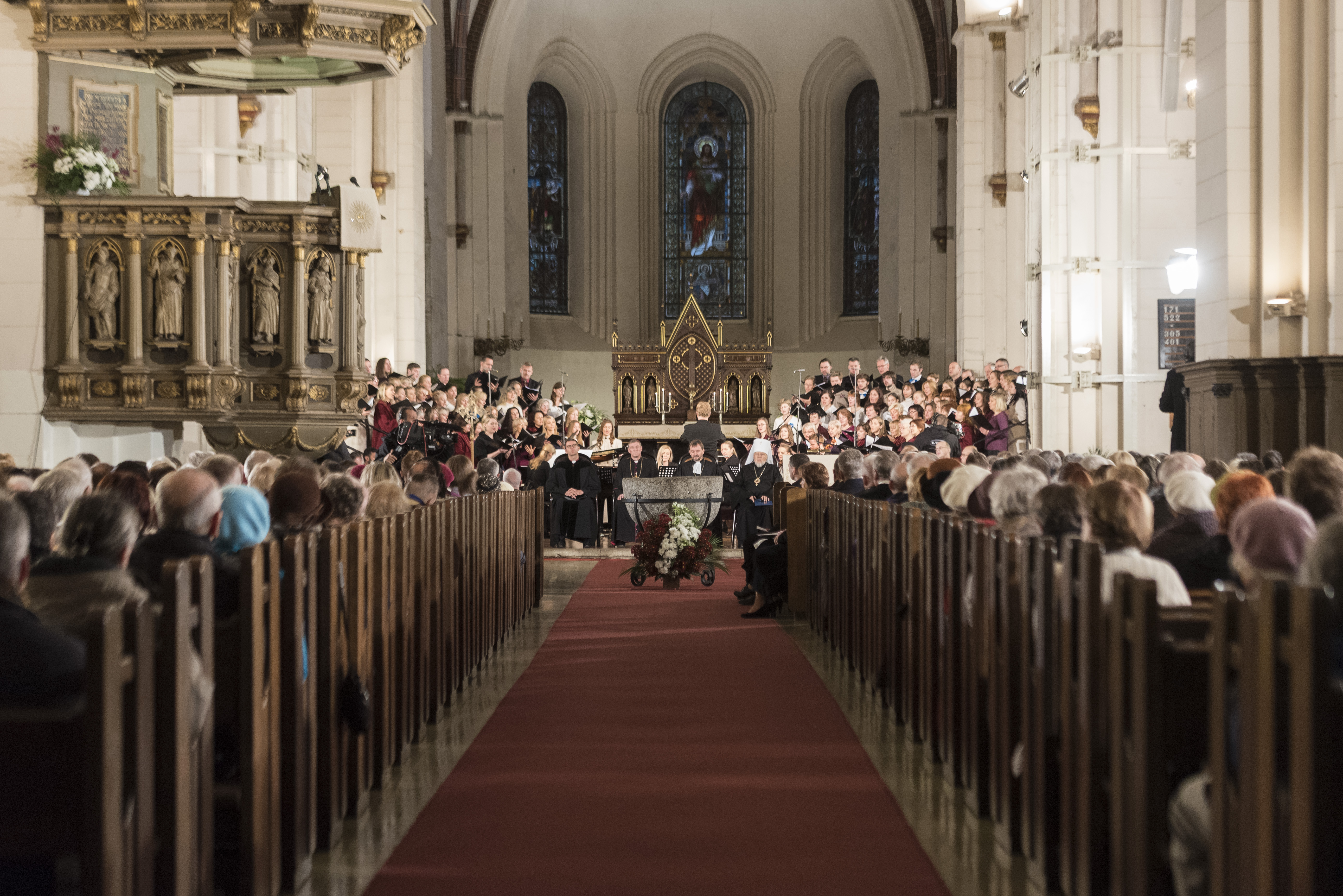 2015.gada 18.novembris. Doma baznīcā notiek ekumēniskais dievkalpojums, kas veltīts Latvijas Republikas proklamēšanas 97.gadadienai. Foto: Reinis Inkēns, Saeimas Administrācija Izmantošanas noteikumi: saeima.lv/lv/autortiesibas